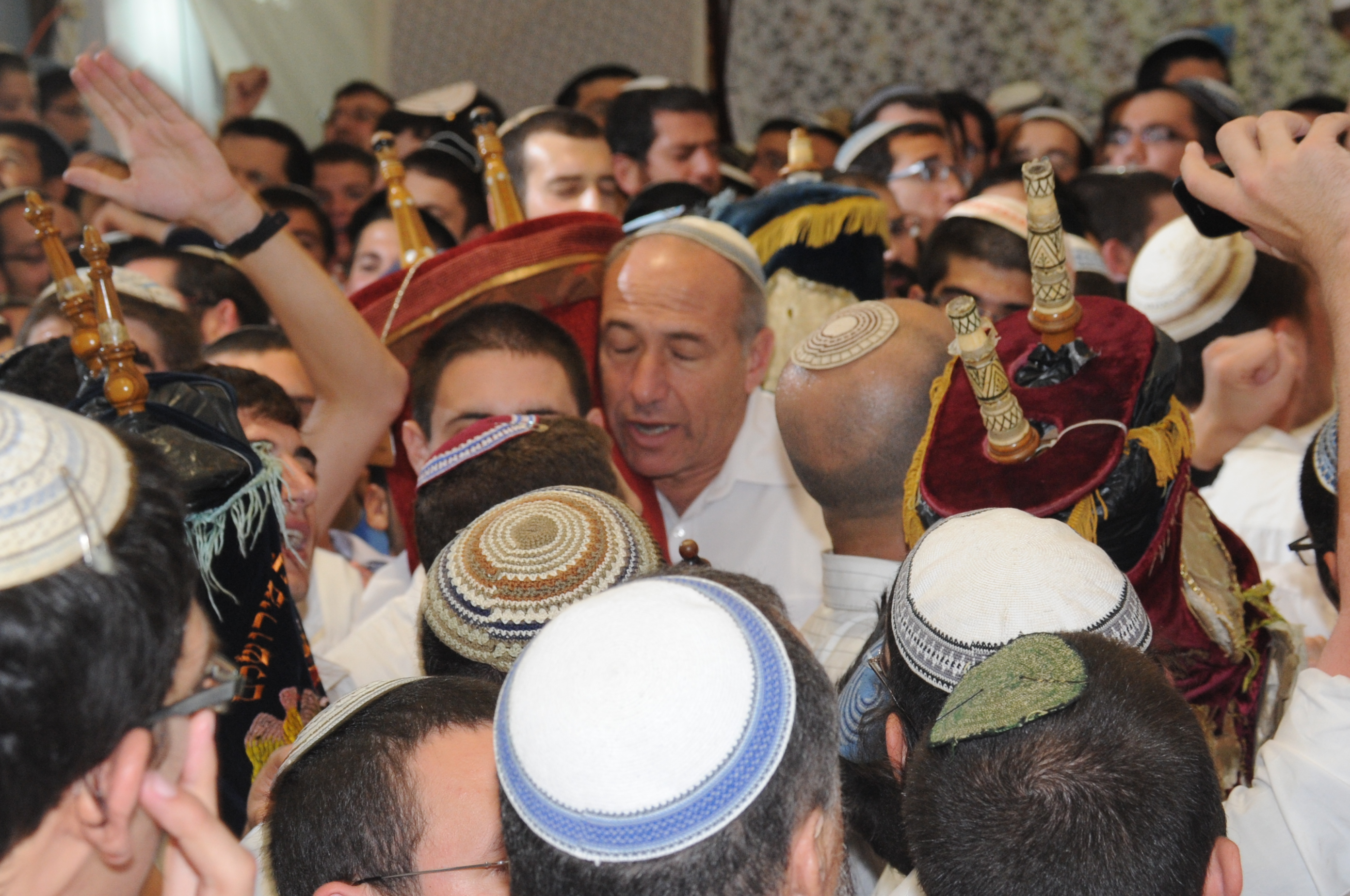 מוטי יוגב בבית הרב קוק